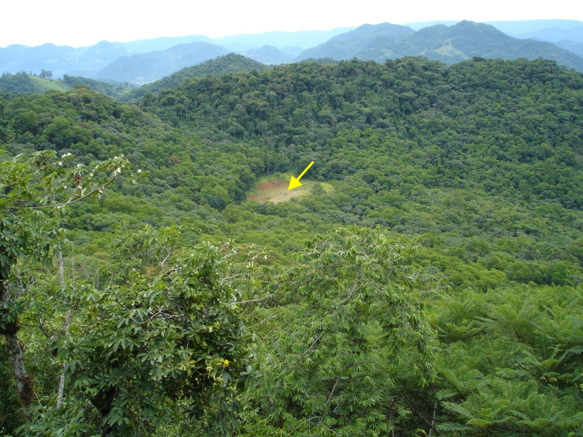 Mata Atlântica, Serra do Mar — Jaraguá do Sul, Santa Catarina (SC), Brasil. Futuro Centro Interpretativo da Mata Atlântica, Parque Natural de Jaraguá do Sul.